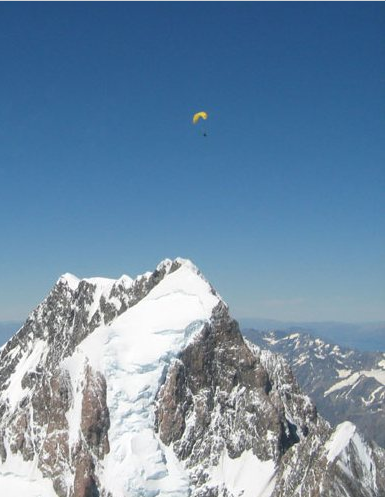 Flug über Mount Cook